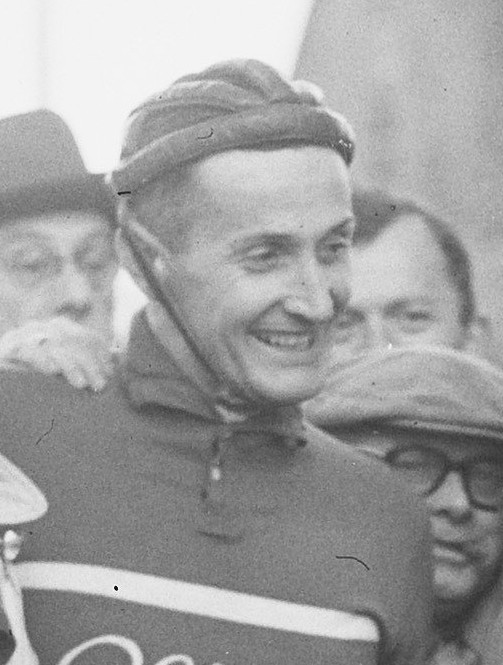 Collectie / Archief : Fotocollectie Anefo Reportage / Serie : [ onbekend ] Beschrijving : Ronde Van Etten Est met Keteleers Datum : 6 april 1953 Trefwoorden : wielrennen Fotograaf : Duinen, […] van / Anefo Auteursrechthebbende : Nationaal Archief Materiaalsoort : Glasnegatief Nummer archiefinventaris : bekijk toegang 2.24.01.09 Bestanddeelnummer : 905-6511